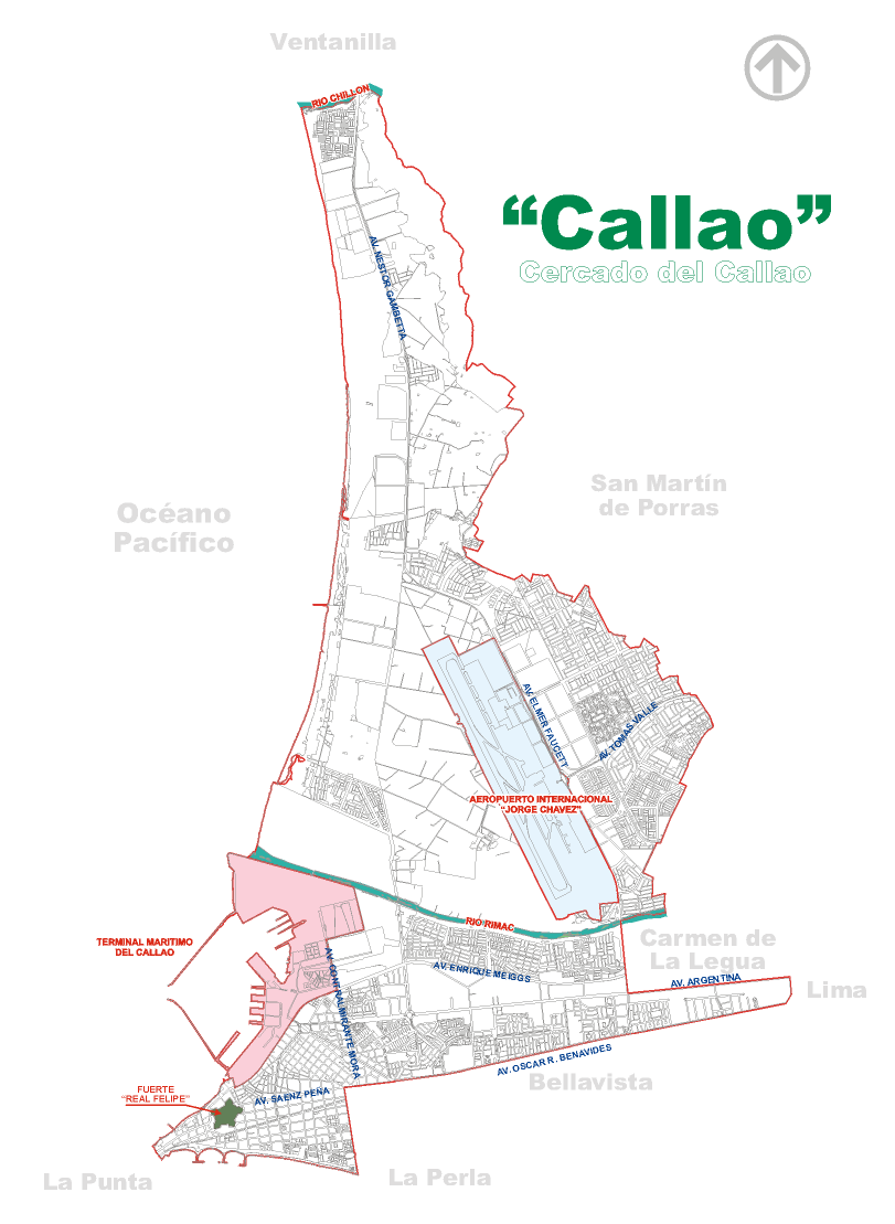 Distrito del Callao Este plano del distrito del Callao ha sido elaborado por --Edgardo Reyes 00:18 23 feb, 2005 (CET)